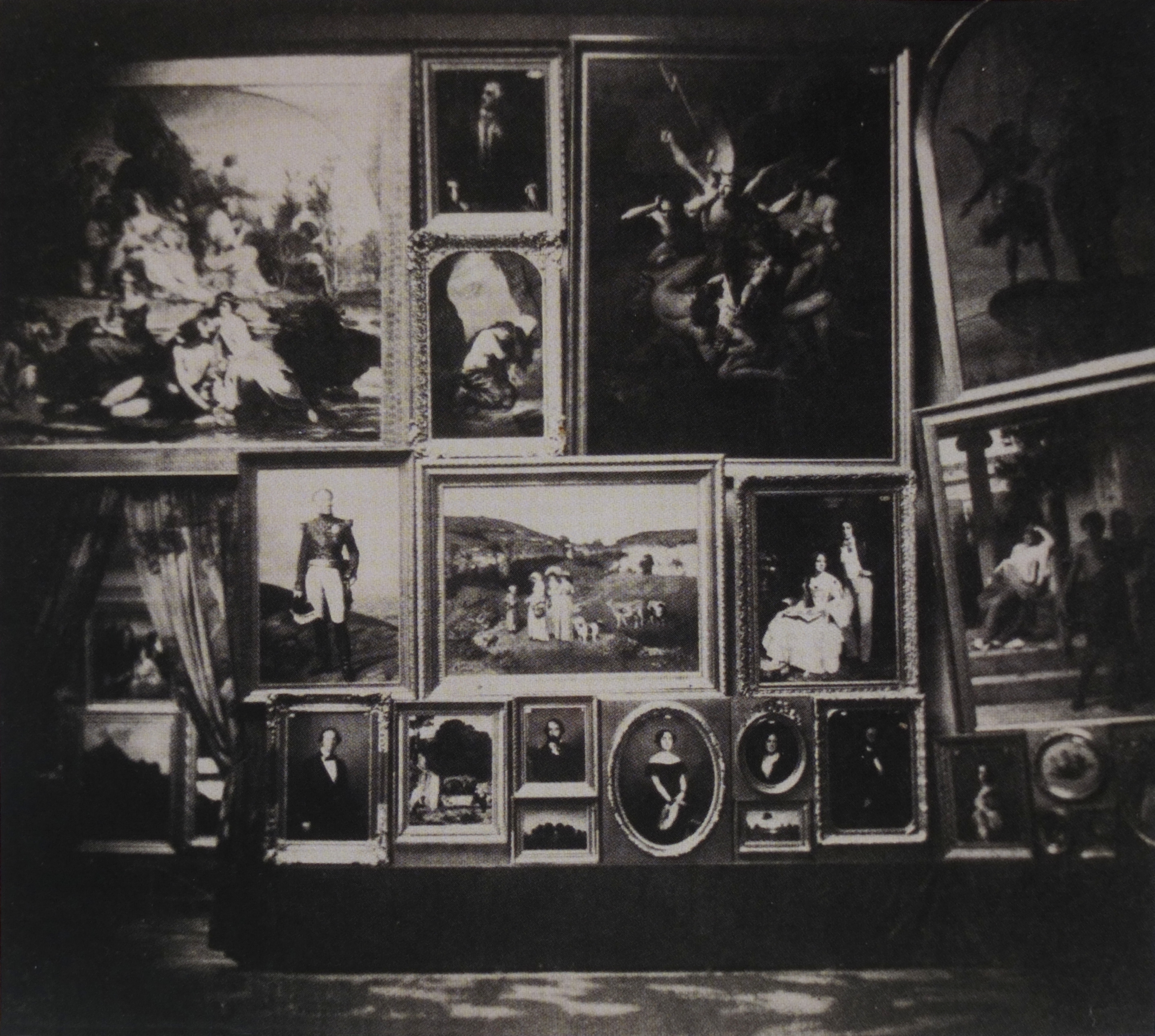 Le Salon de 1852 au Palais-Royal, photographie de Gustave Le Gray sur papier salé à partir d'un négatif sur verre, Musée d'Orsay. Au centre Les Demoiselles de village de Gustave Courbet, aujourd'hui au Metropolitan Museum of Art de New York.